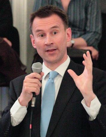 ジェレミー・ハント英国国会議員 英語版ウィキペディアから